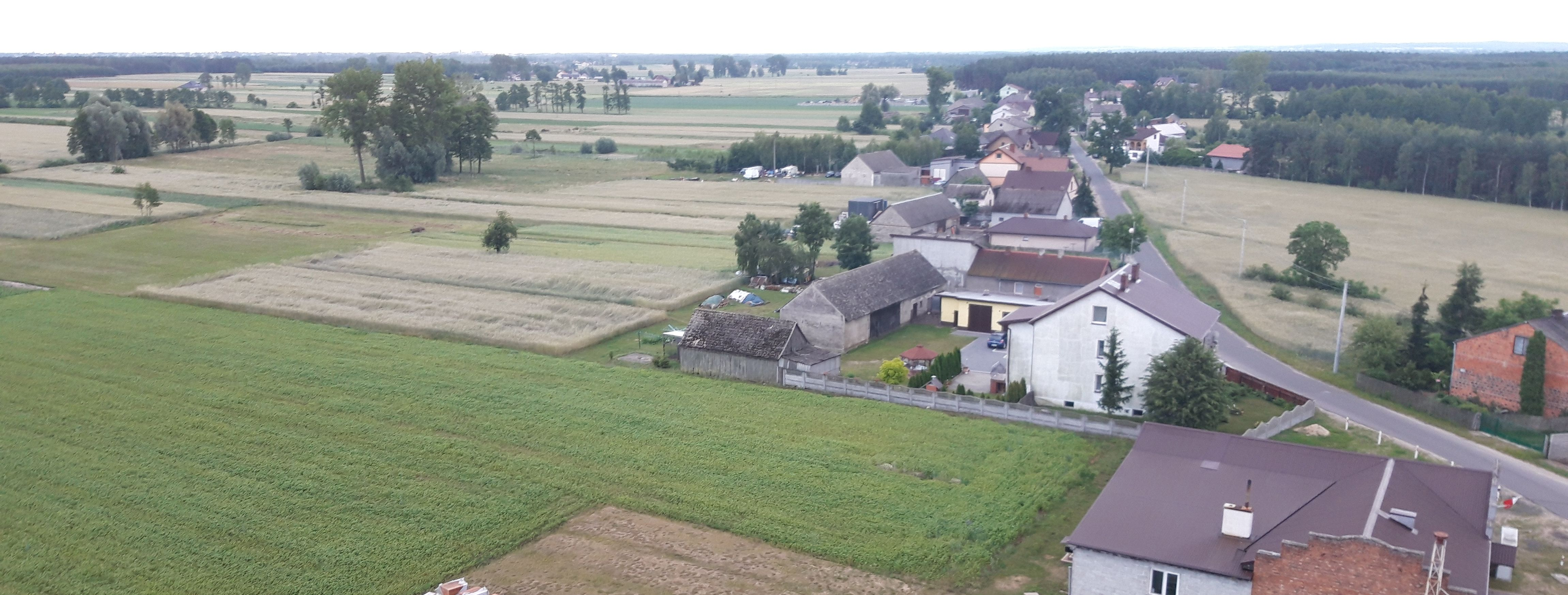 Południowa część wsi widziana z wysokości 30m.